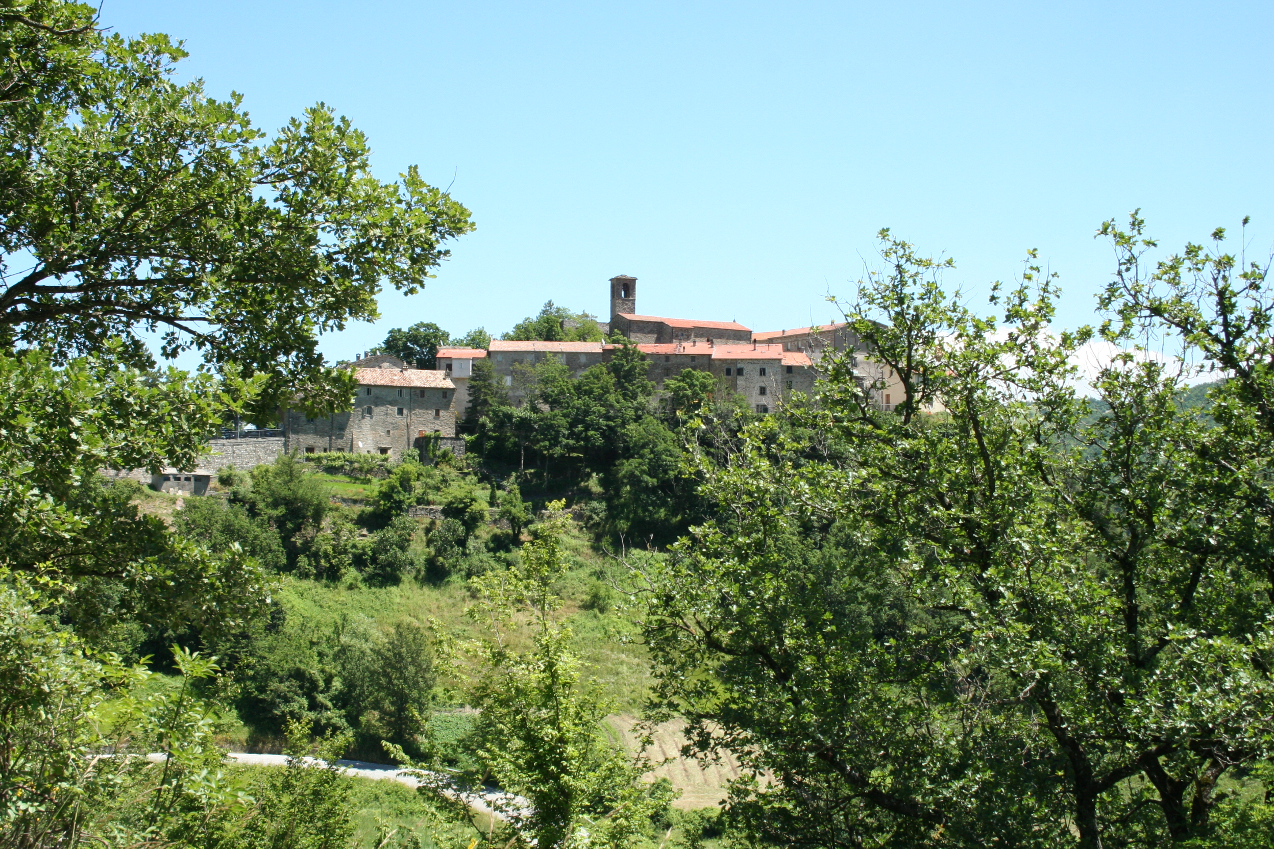 Vista del centro storico di Casteldelci, provincia di Rimini, Italia.